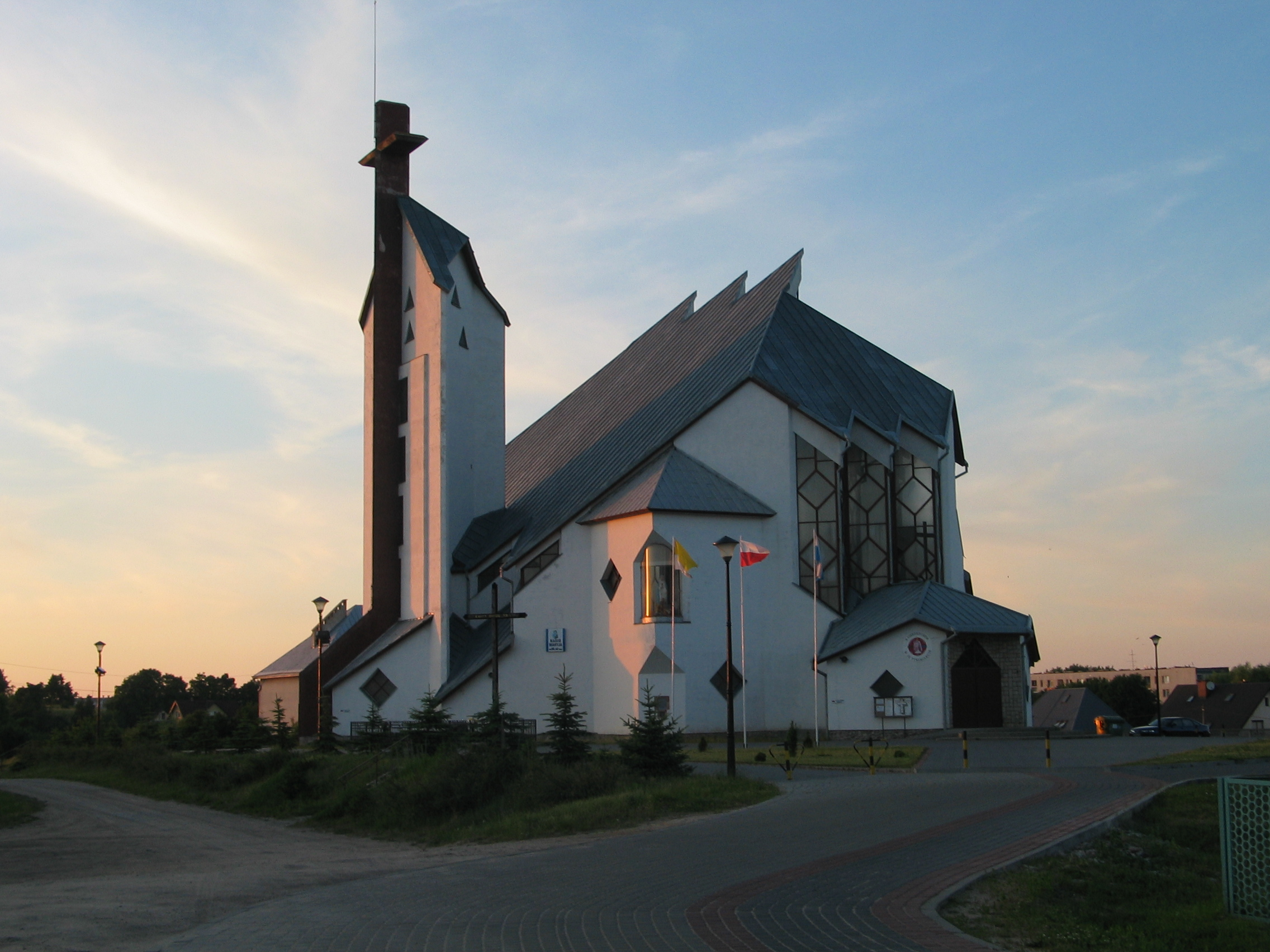 Kościł rzymsko-katolicki p.w. bł. Honorata w Mrągowie